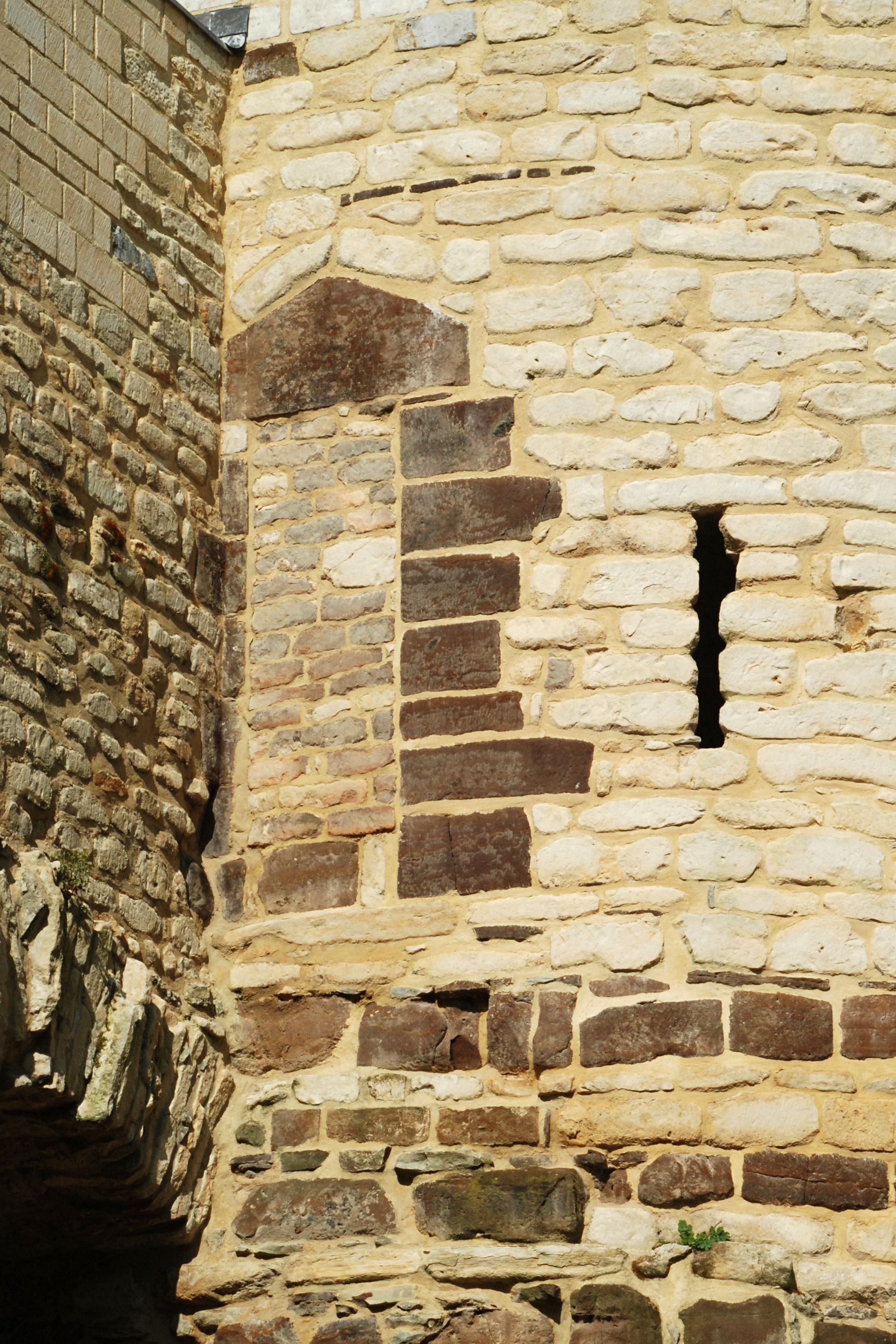 Belgique - Brabant flamand - Première enceinte de Louvain - Parc Saint-Donat - tour ouest